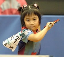 平野美宇選手